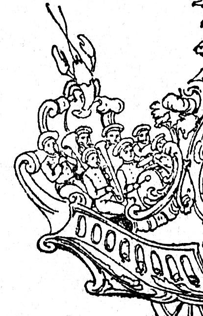 Détail d'un dessin figurant le Char de Rosa Blanche Reine des Reines de Paris 1906 où on voit un orchestre de marmitons bigophonistes.